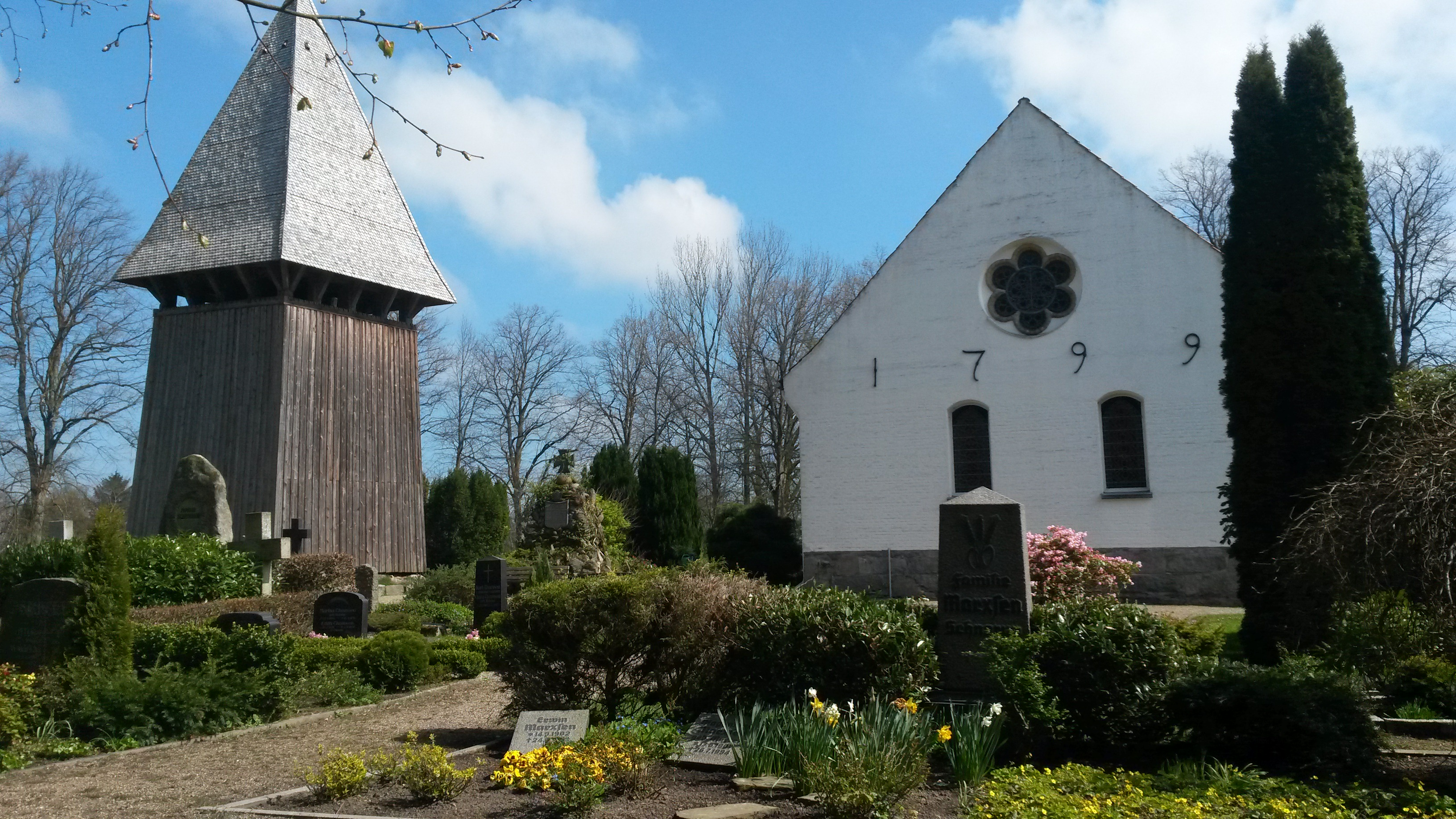 Glockenhaus der Kirche St. Johannes der Täufer. Adresse: Am Pastorat, 24891 Schnarup-Thumby.